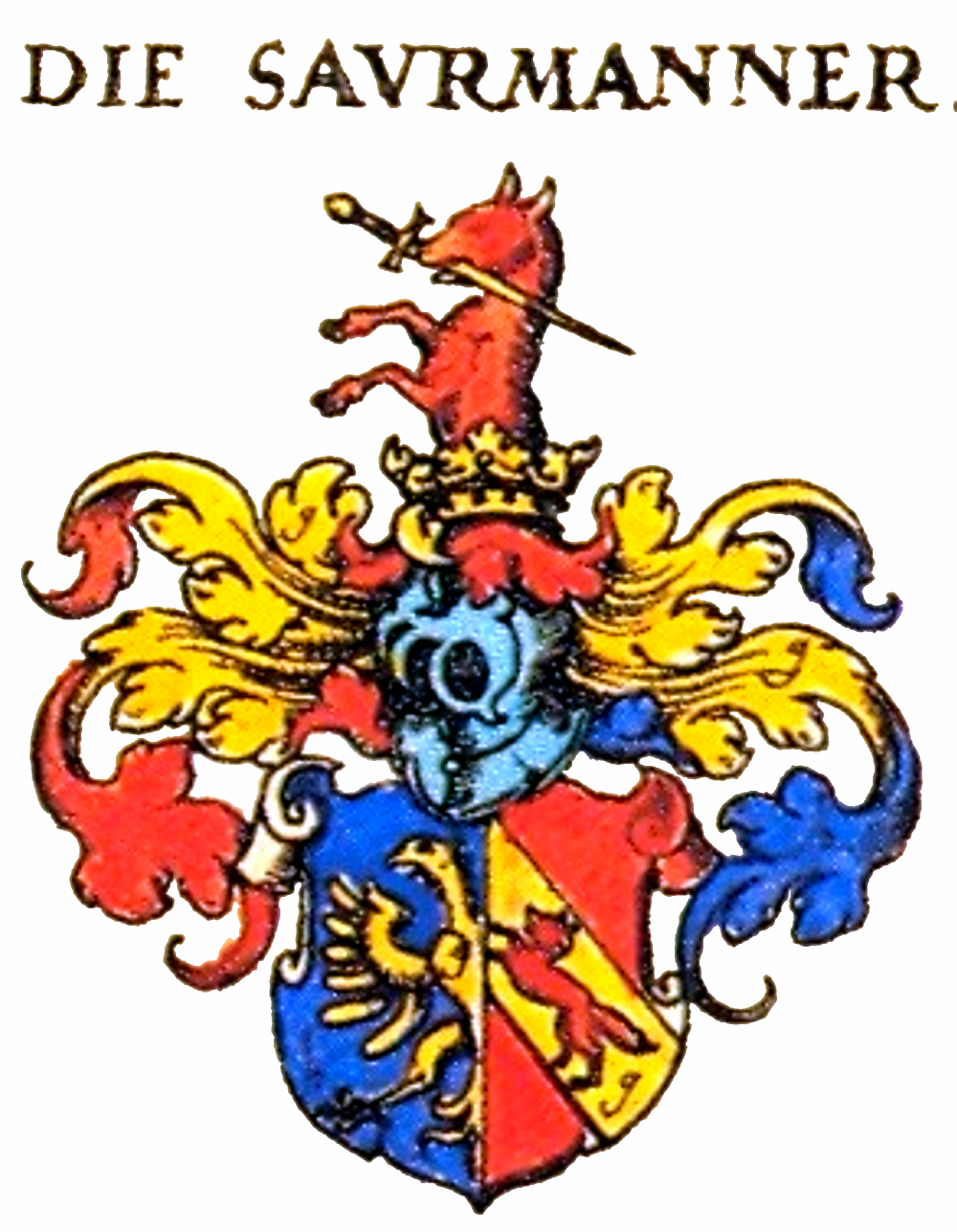 Wappen der Sauermanner